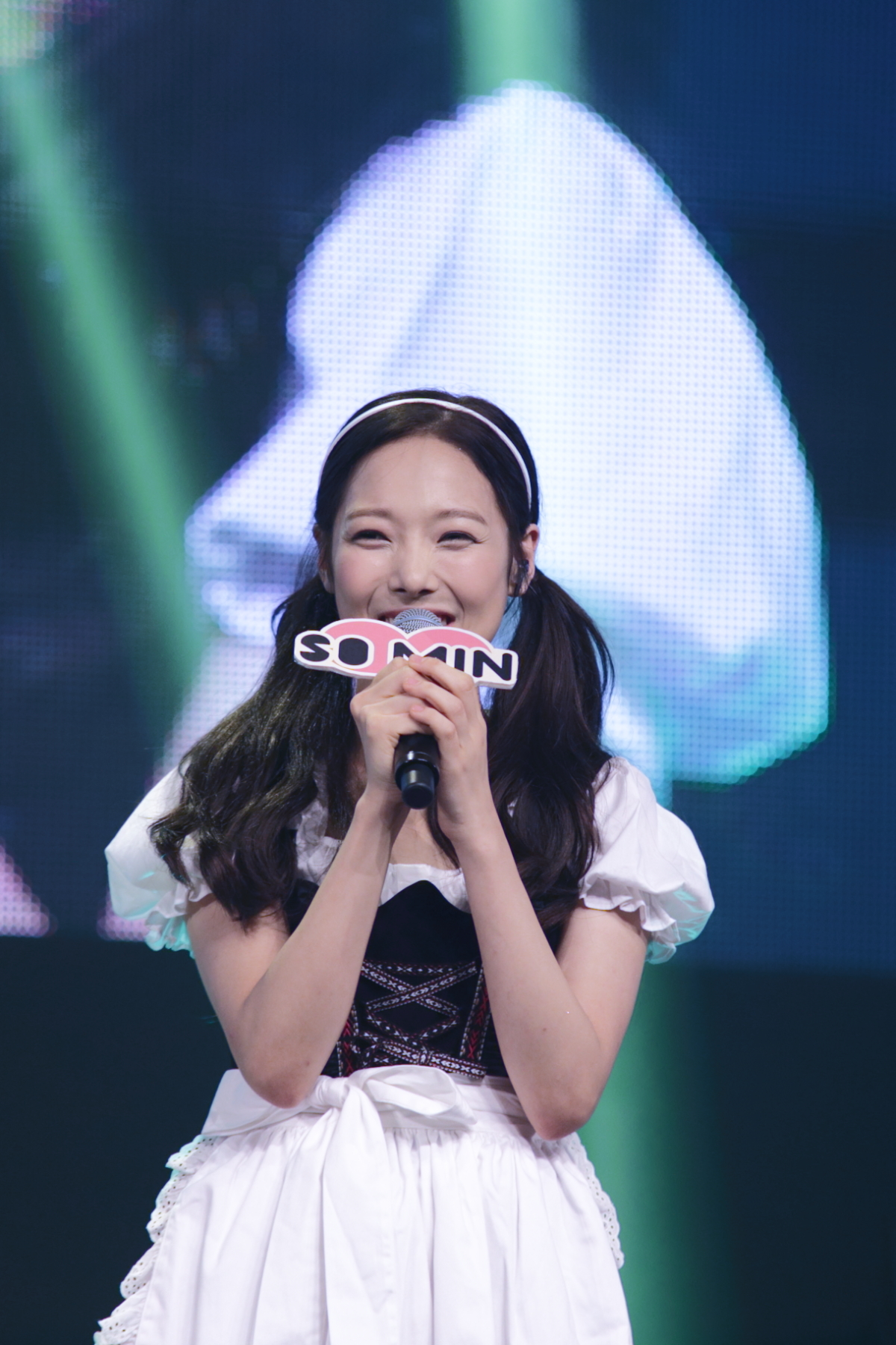 150825. 에이프릴 쇼케이스.